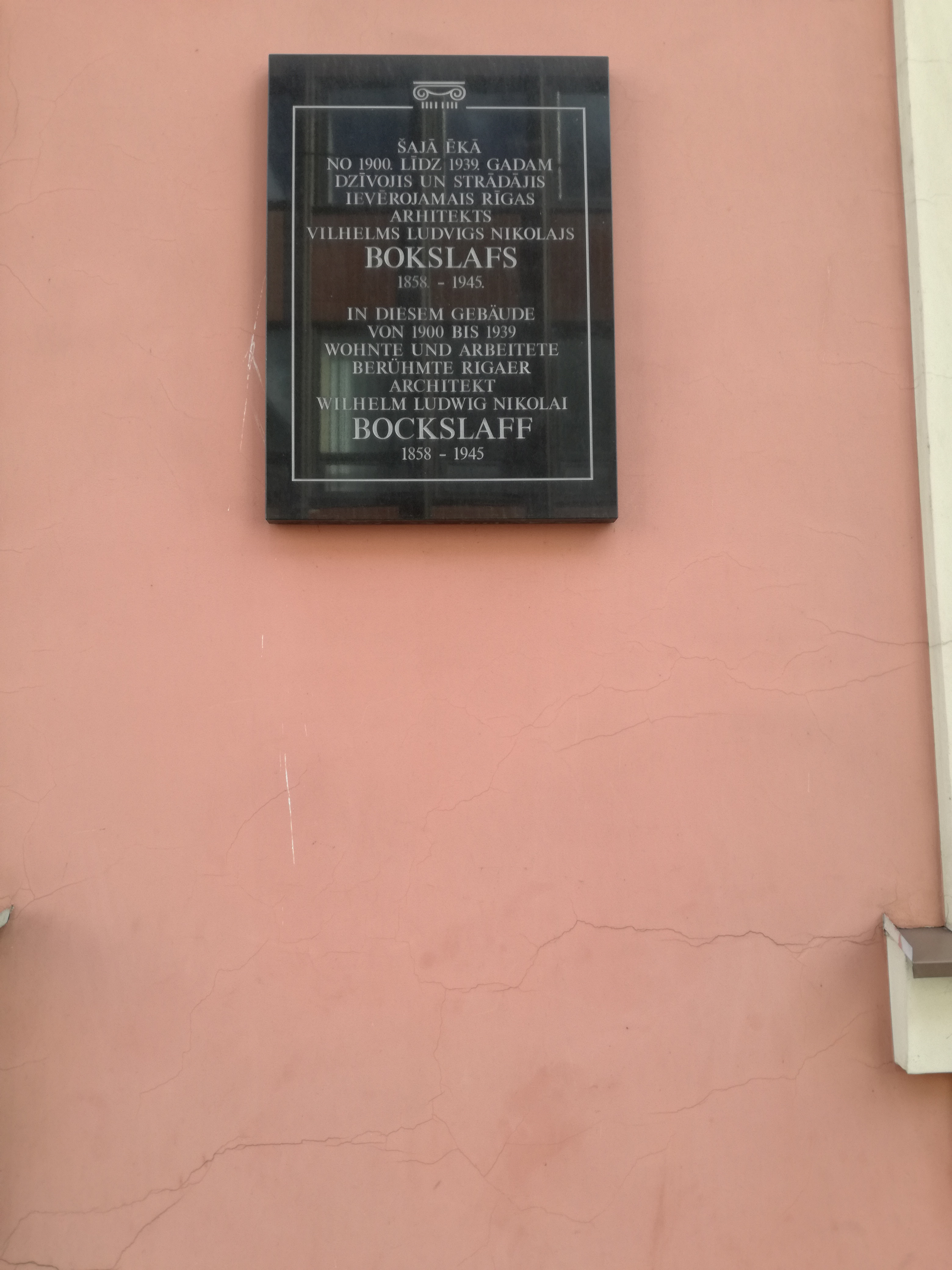 Вецрига